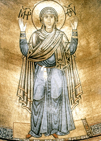 Оранта Мозаика